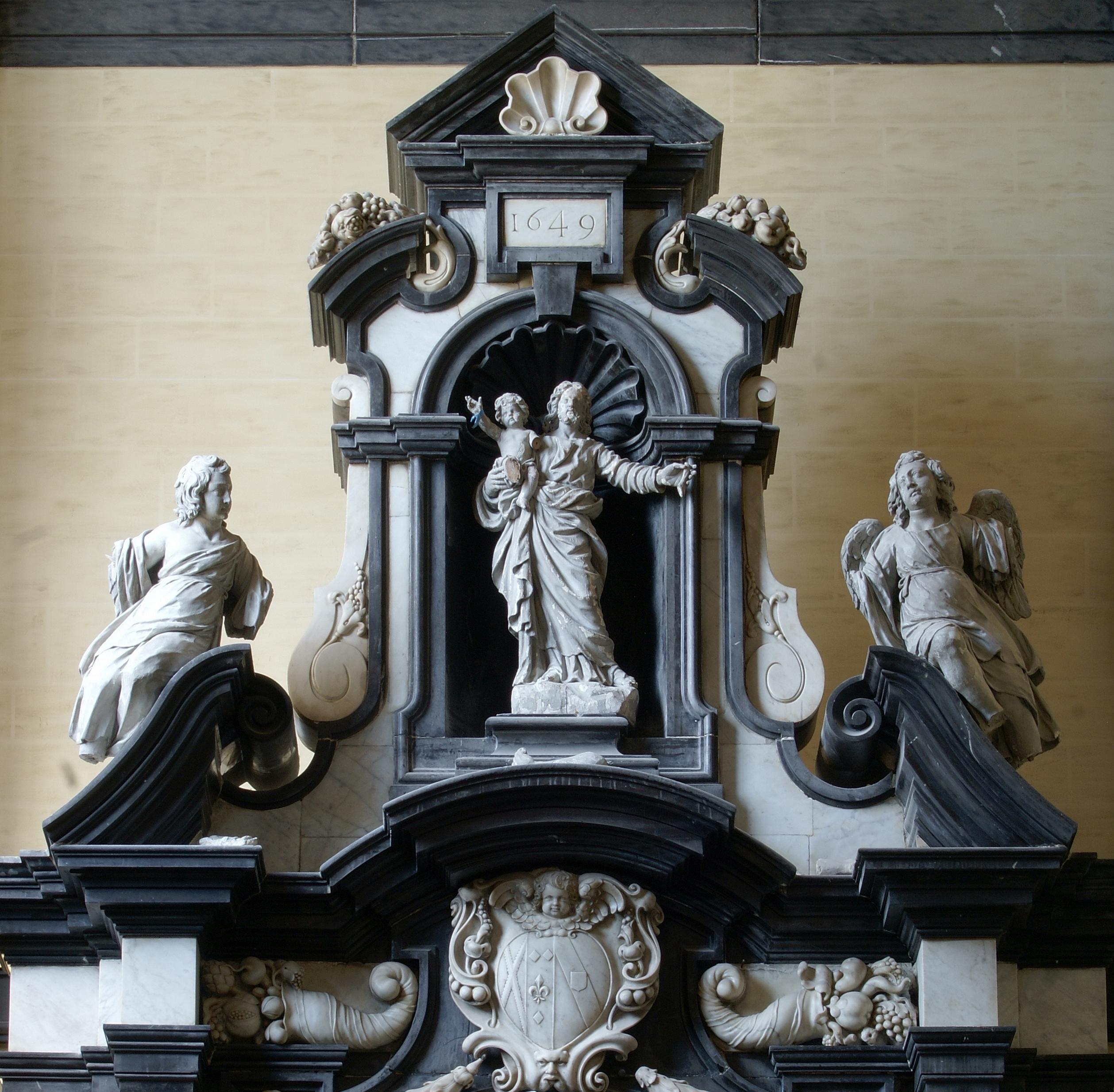 Eglise Saint Loup (Namur) - Nef latérale gauche, Autel Ste-Marie; Saint-Loupkerk (Namen) - Linkerzijbeuk, St-Maria-altaar